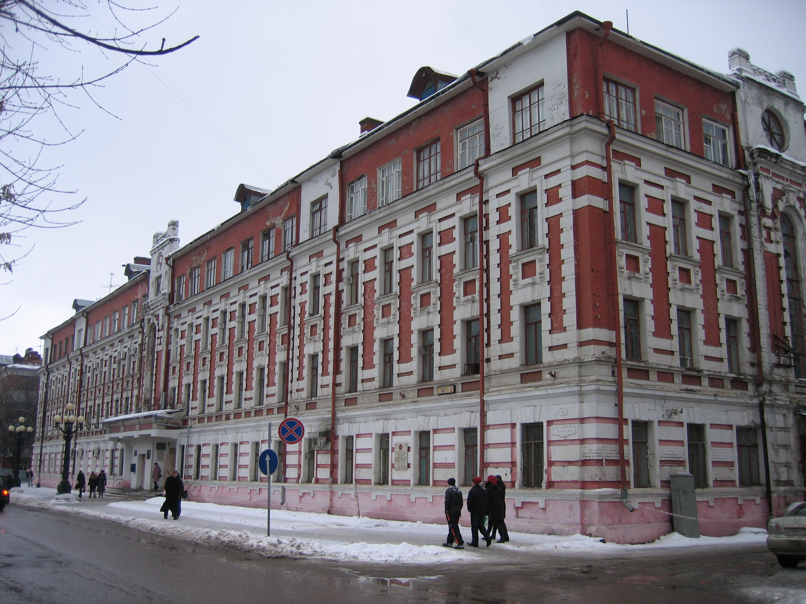 Altes Verwaltungsgebäude (heute u.a. Sozialamt) in Orechowo-Sujewo, Russland